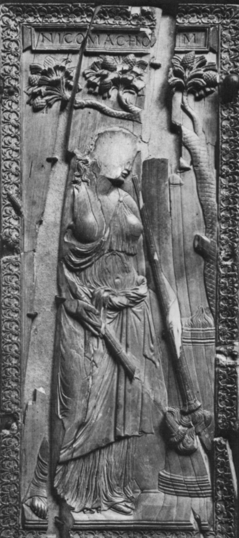 Dittico dei simmachi 01 louvre